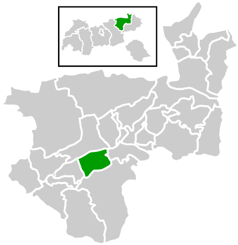 Lage der Gemeinde innerhalb des Bezirks Kufstein